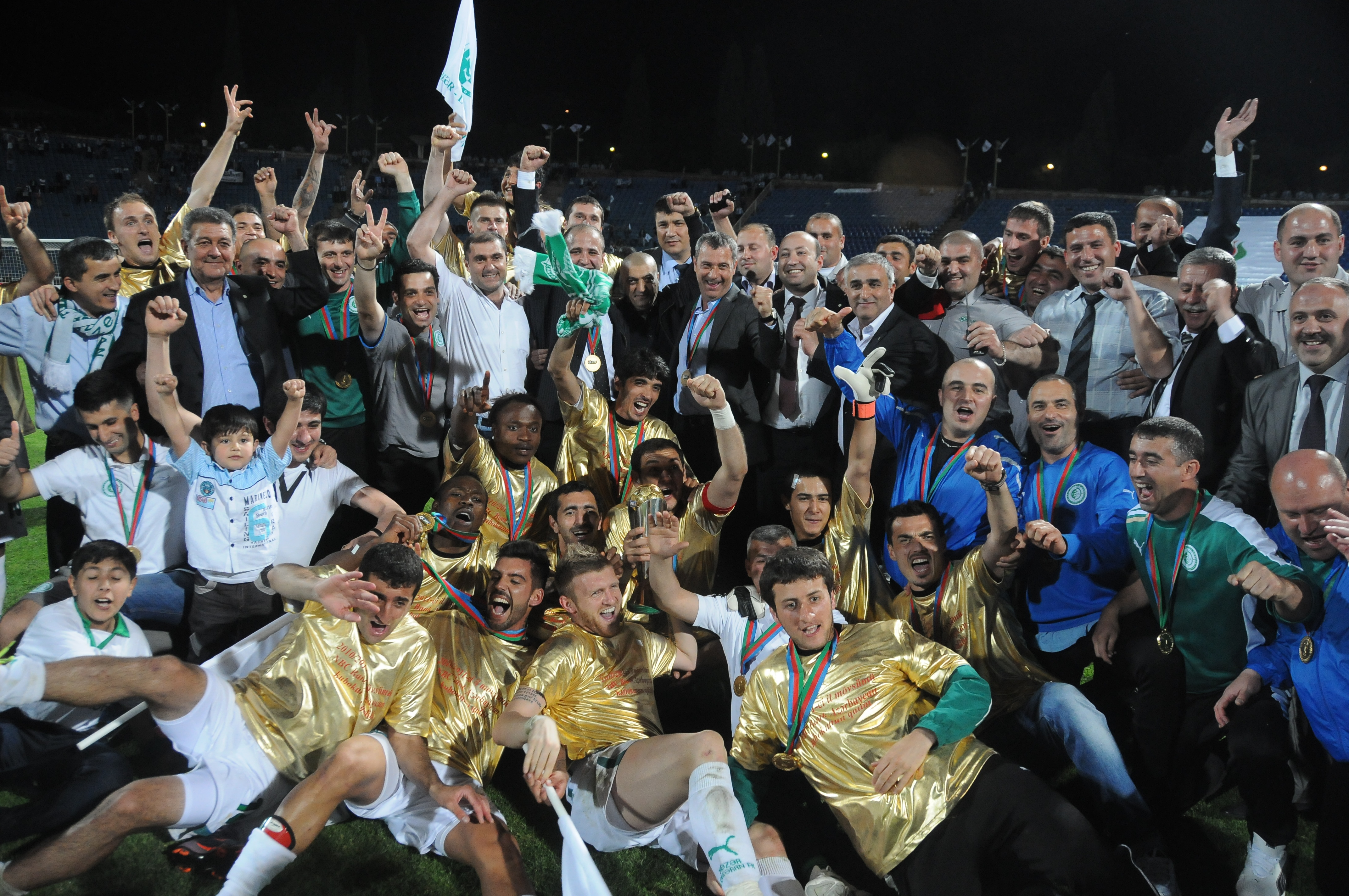 24 may 2011-ci il. "Xəzər Lənkəran" tarixində 3-cü dəfə Azərbaycan kubokunu qazandı.